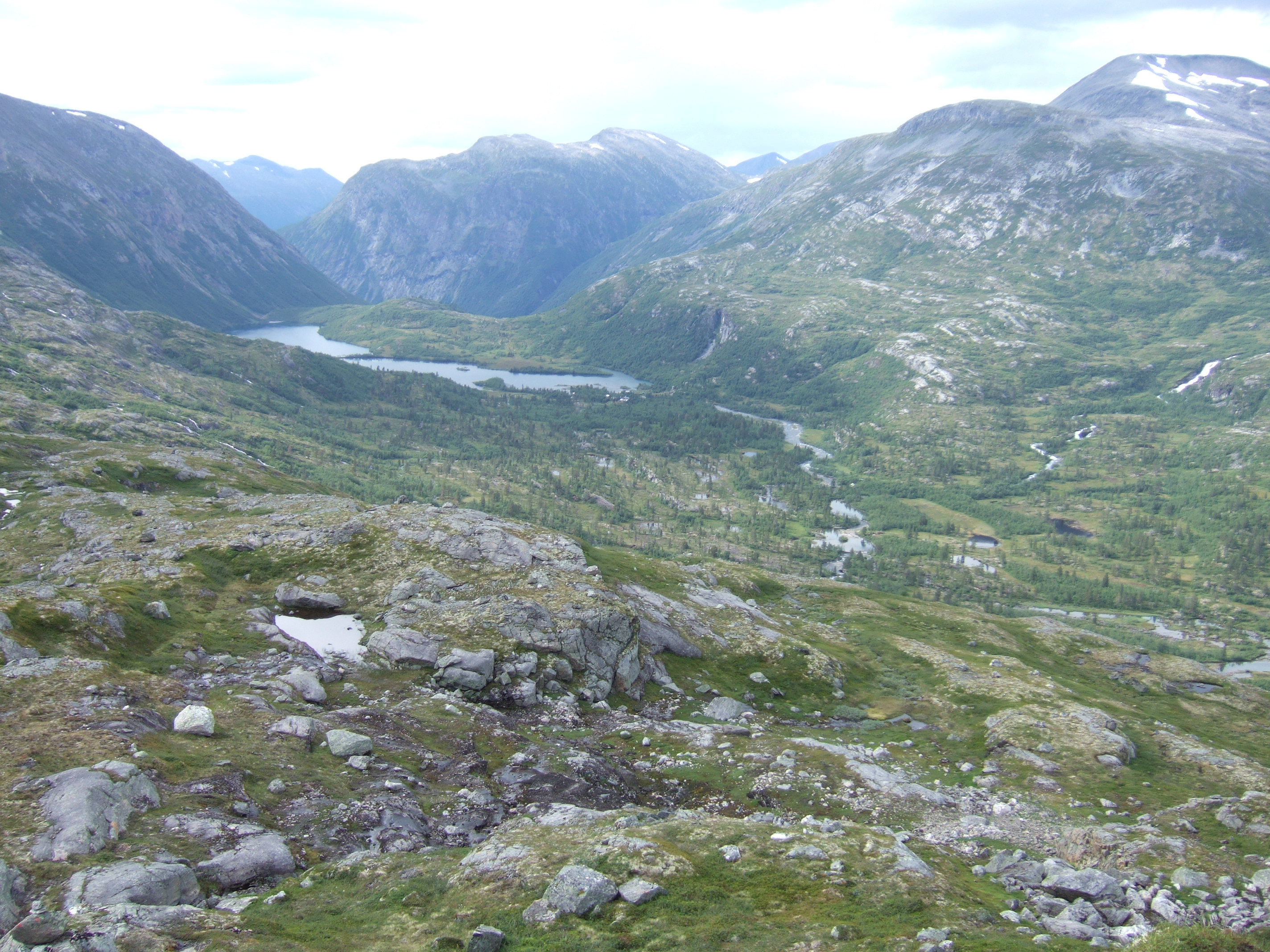 Reindalen is a valley in Tafjordfjella. In the valley lies Reindalseter tourist cabin that is a center for the network of trails in Tafjordfjella.